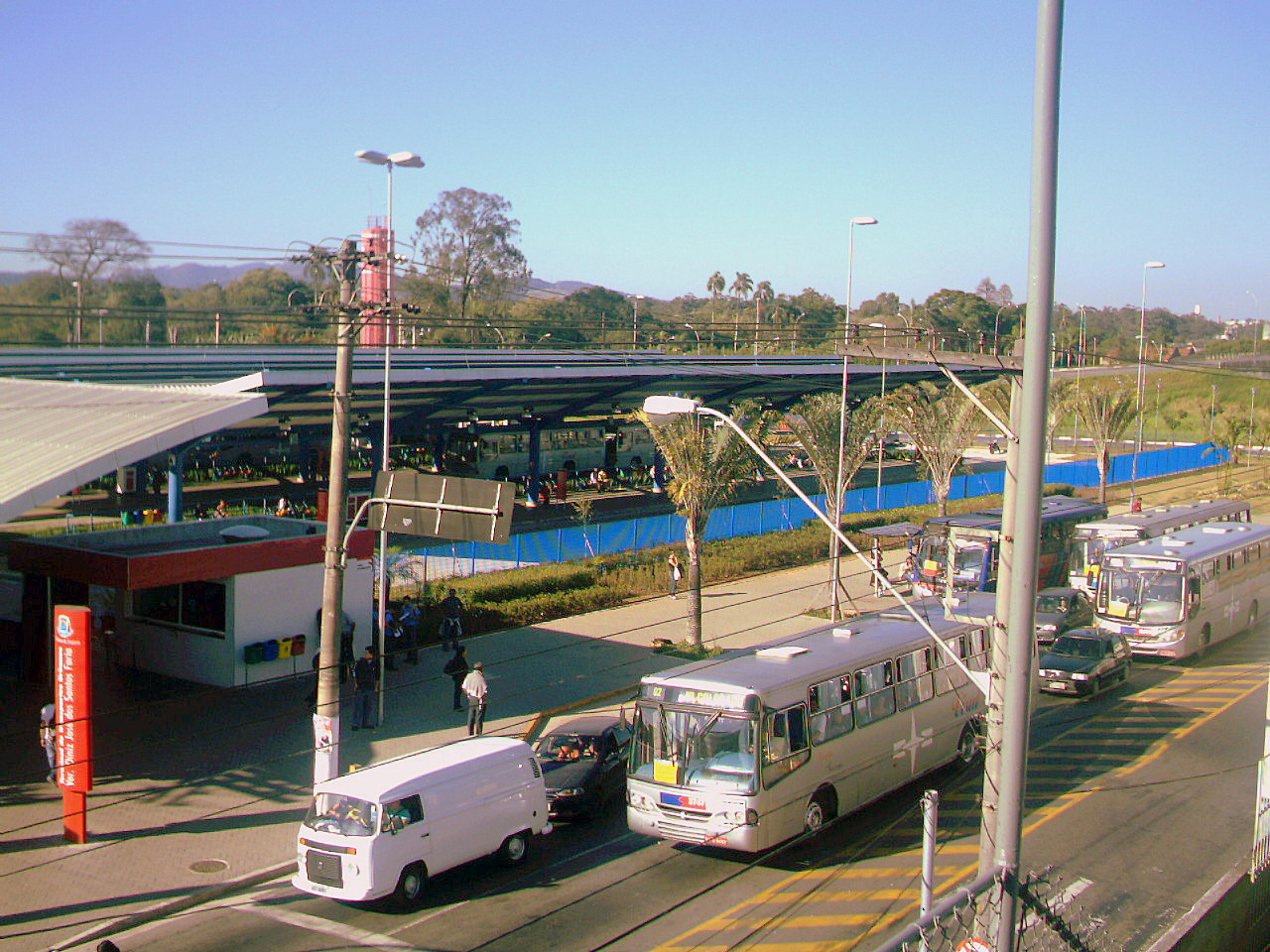 Terminal Urbano de Suzano